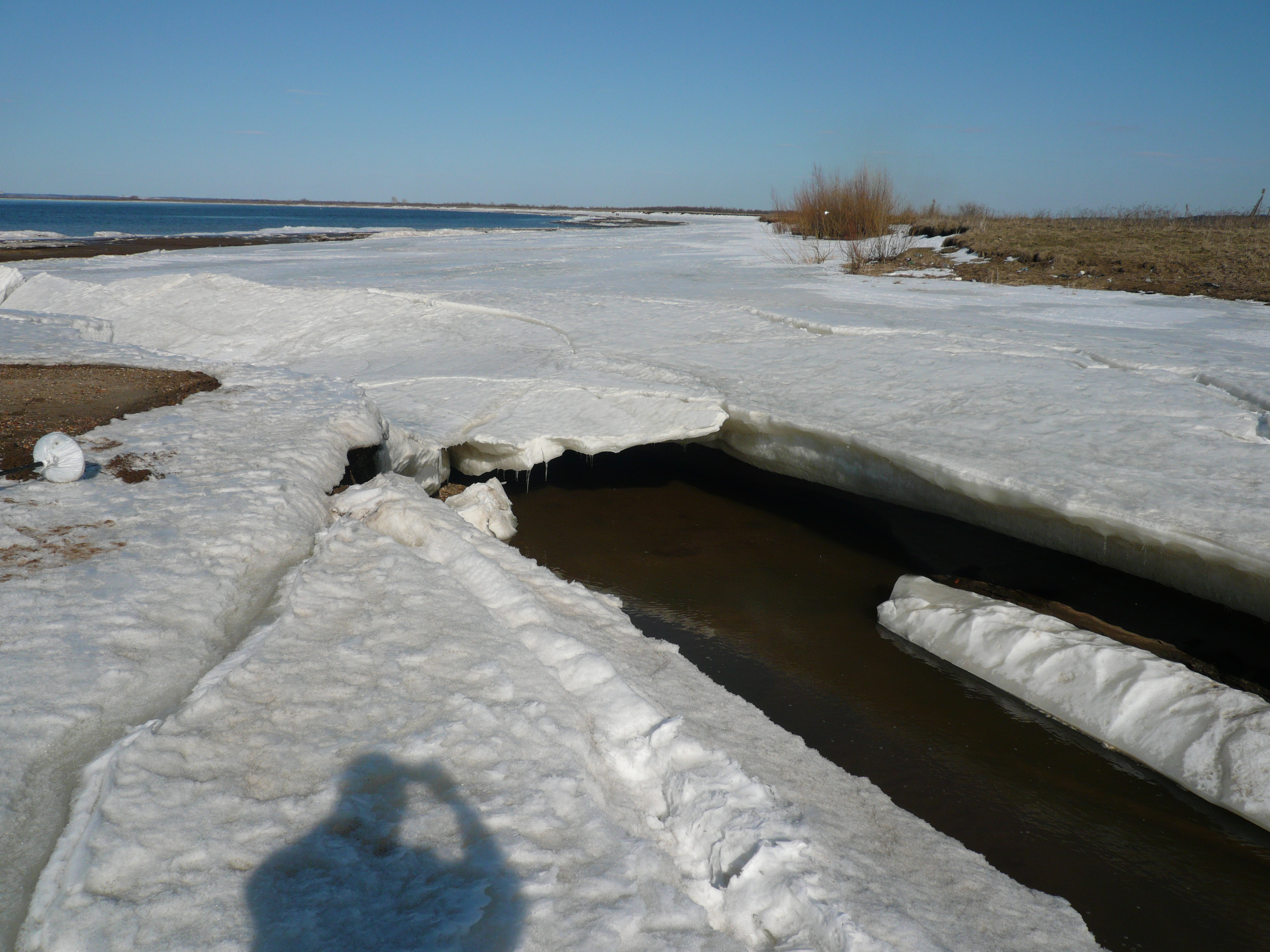 Устье Нижней Мулянки.